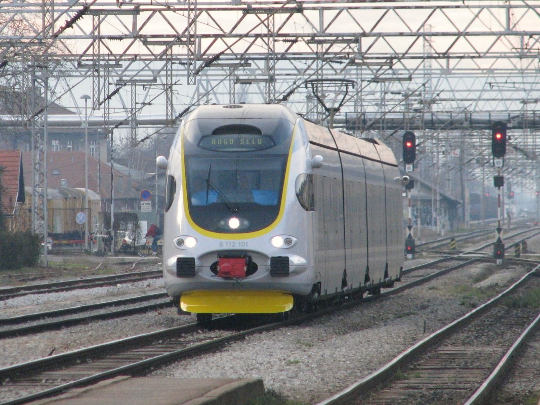 HŽ 6112